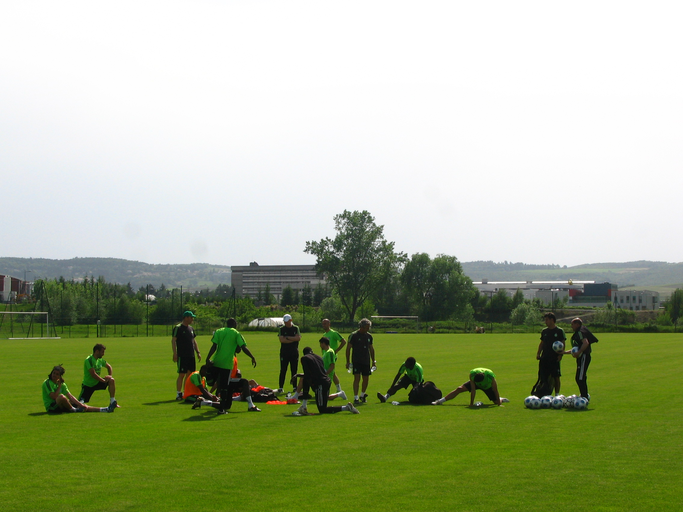 Joueurs pros de l'ASSE en décrassage à l'Etrat (Loire), fin de saison 2008-09.